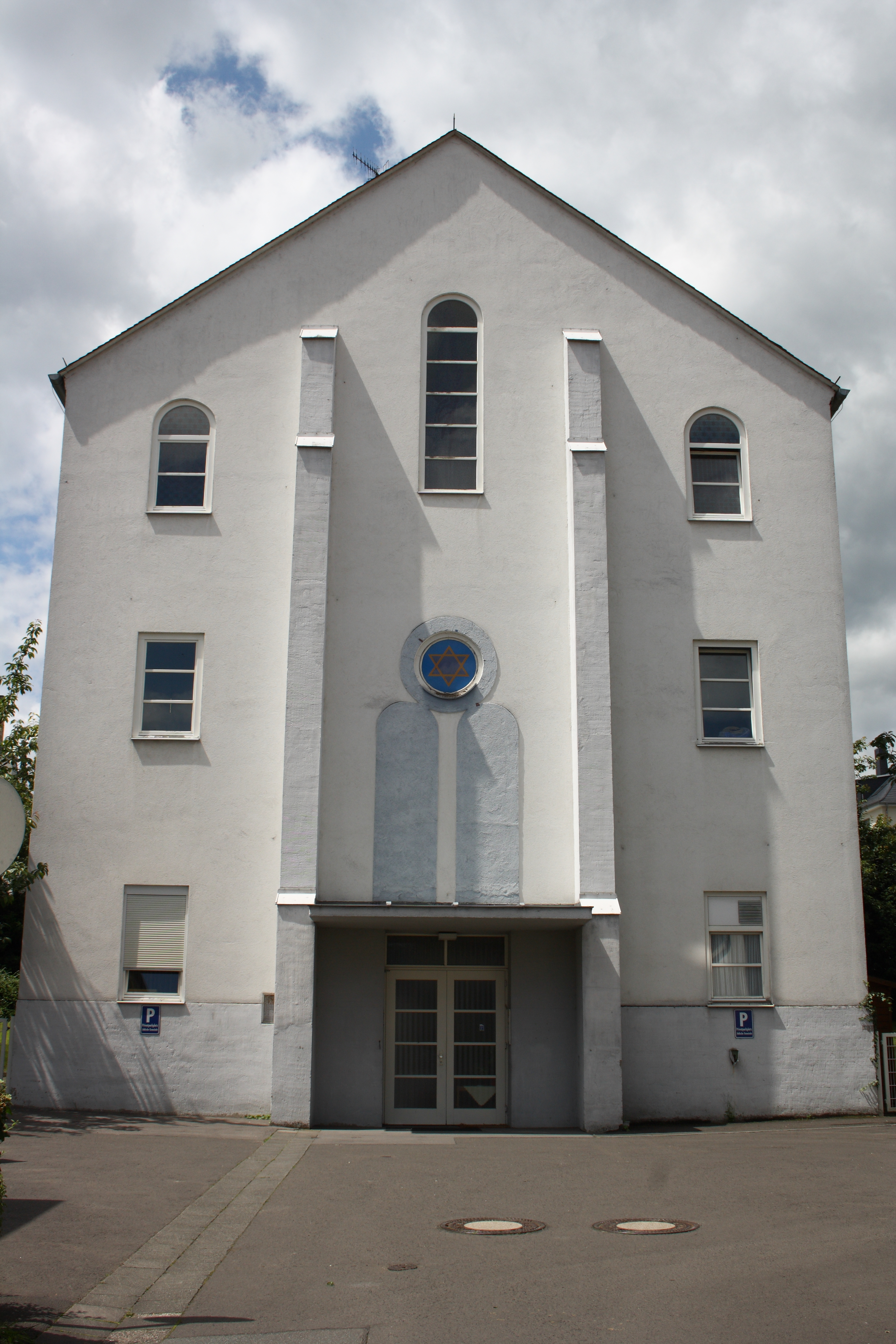 Synagoge in Bad Nauheim im Wetteraukreis (Hessen)